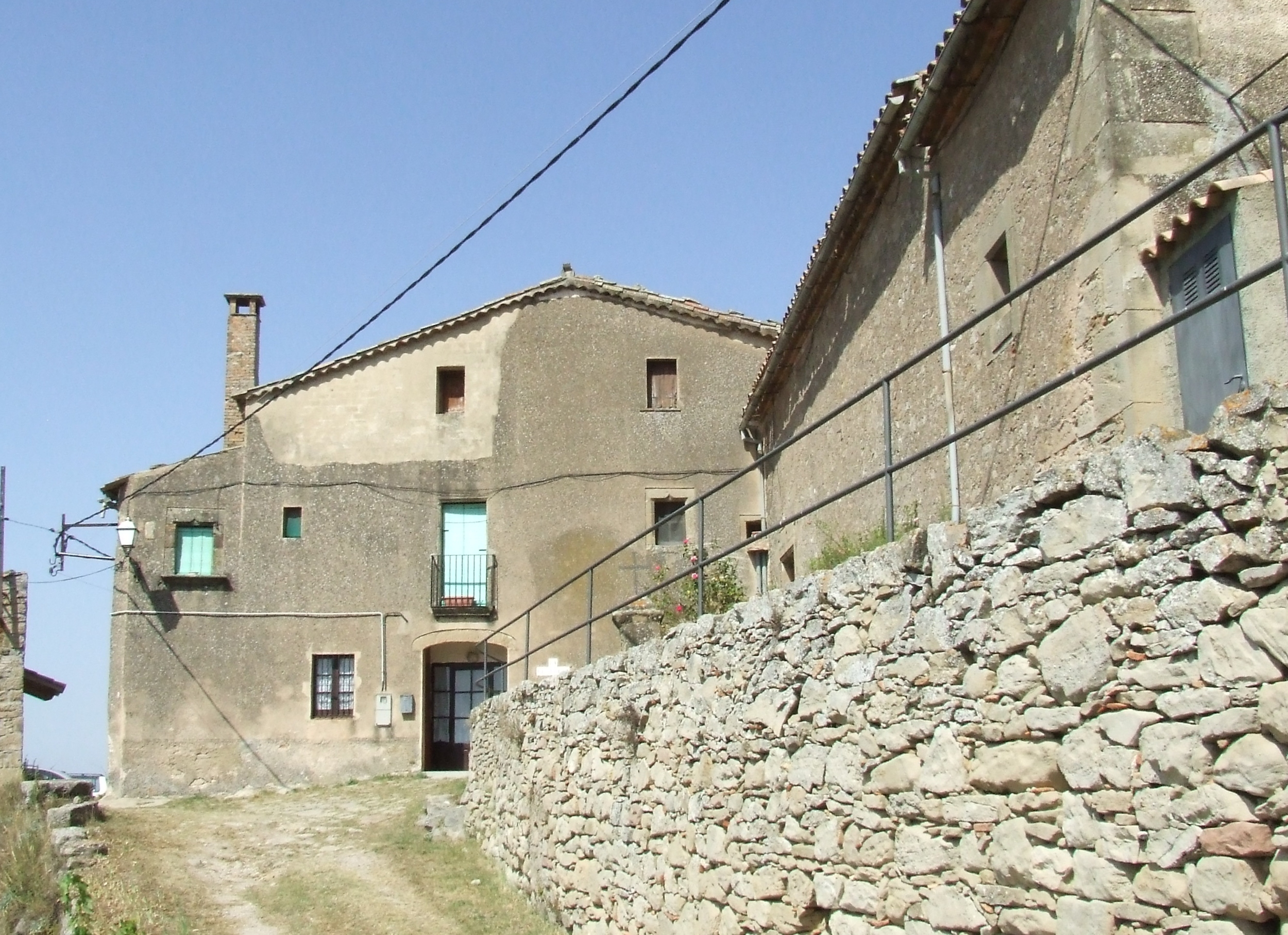 La Rectoria de Granera (Moianès)